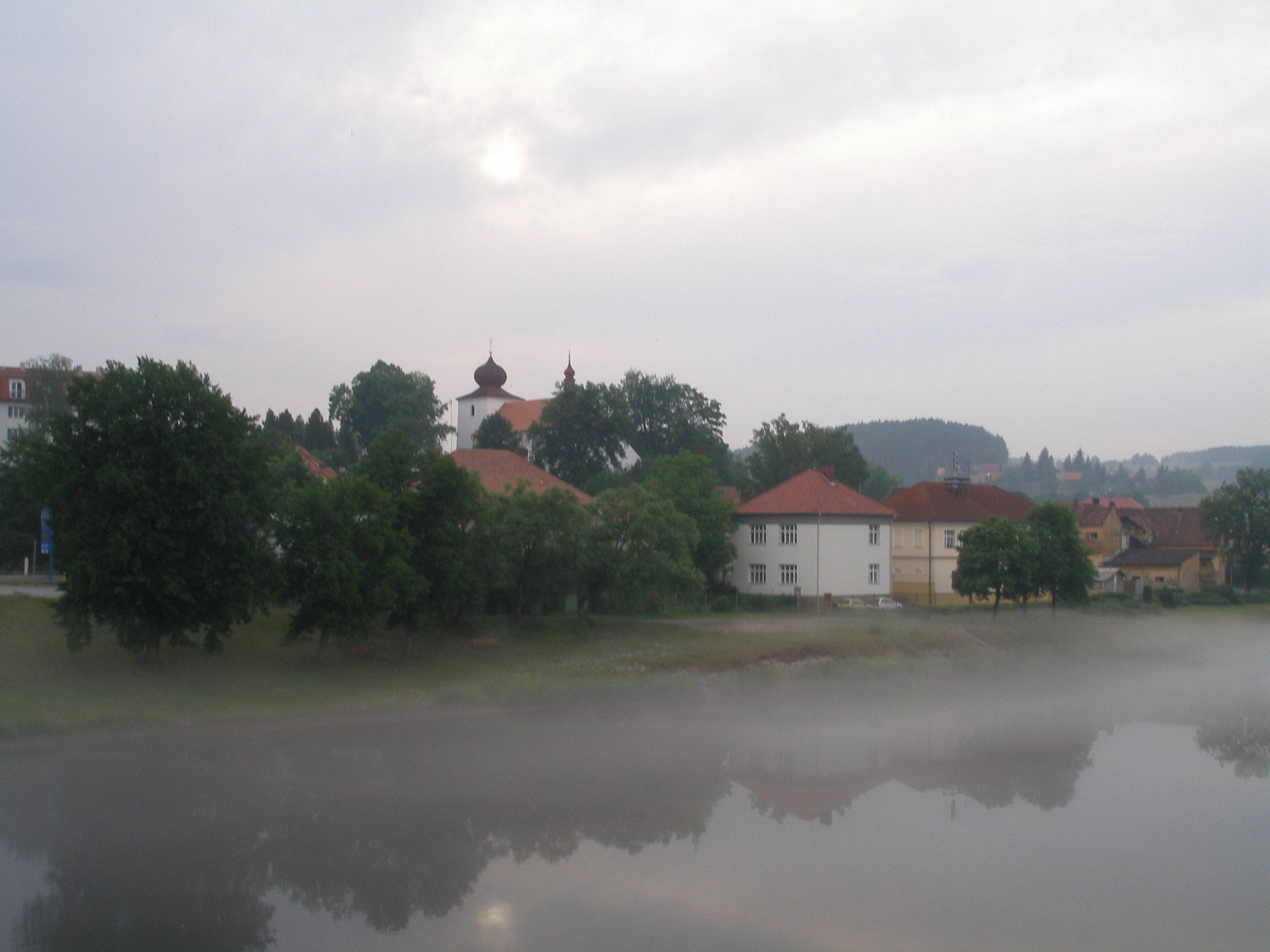 Pokled z mostu přes Vltavu na část levobřežní zástavby Kamýka nad Vltavou s kostelem